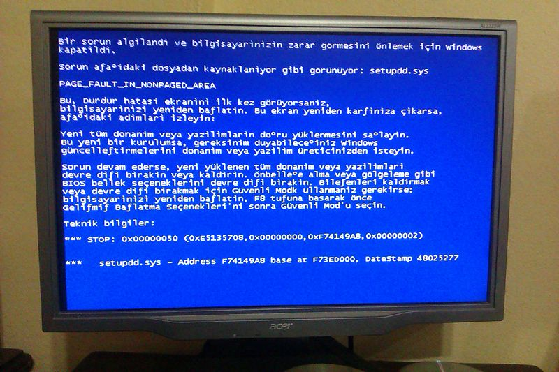 Windows XP Türkçe mavi ekran hatası